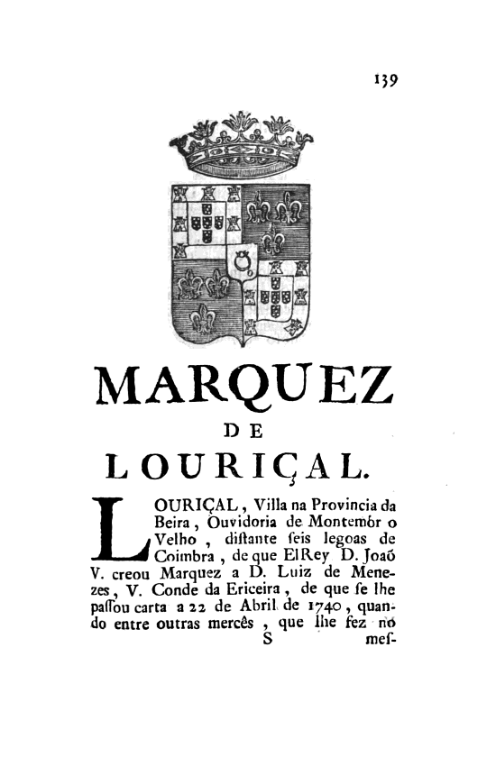 Página 139 das "Memorias Historicas e Genealogicas dos Grandes de Portugal" ― Marqueses de Louriçal.